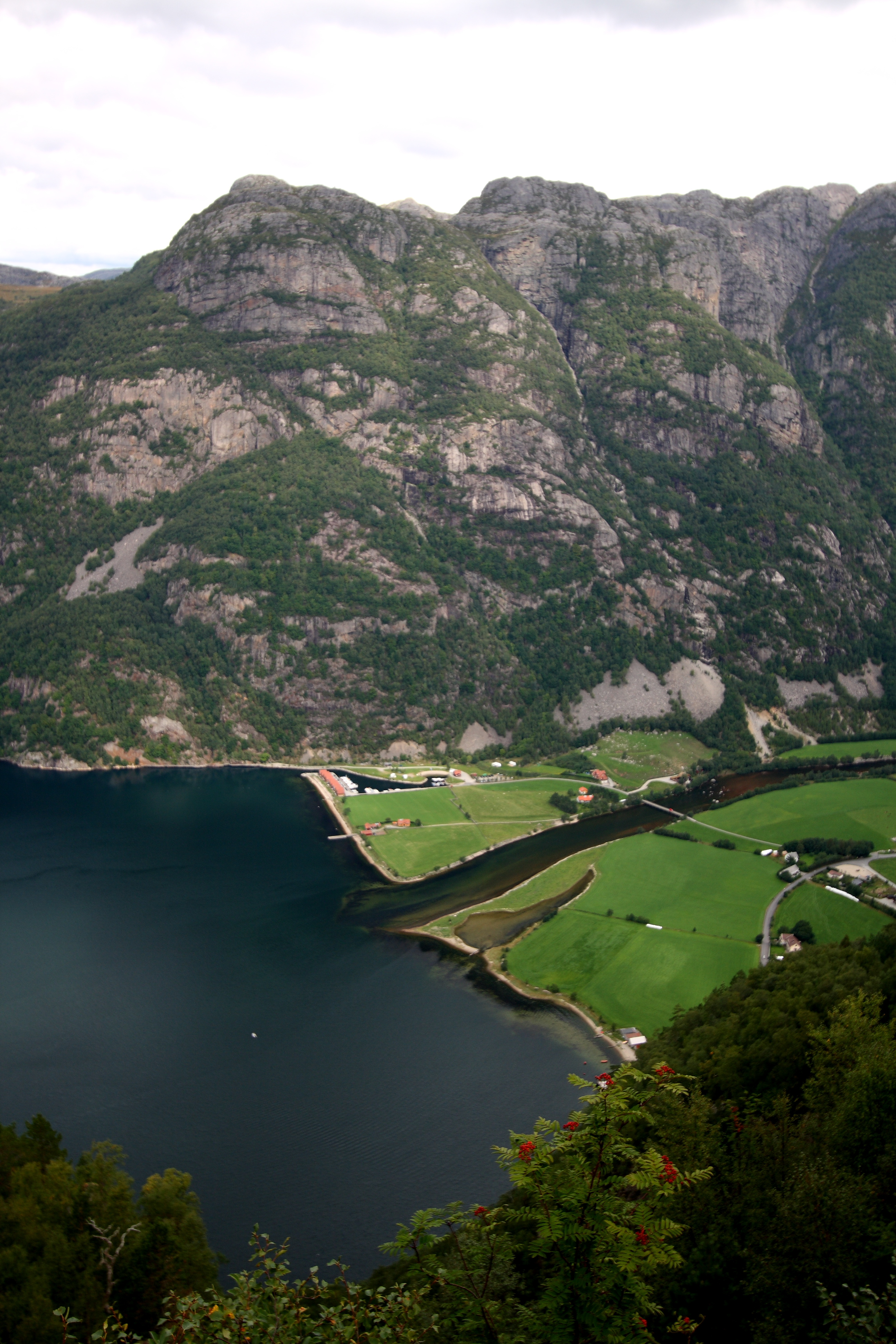 Frafjord inst i Frafjorden